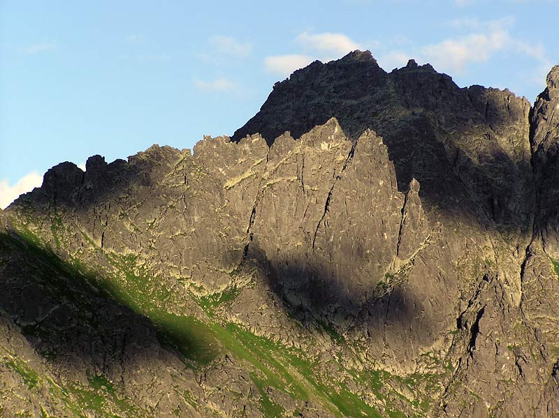 Dwa wierzchołki Żabiego Mnicha (po lewej główny, po prawej niższy, zwany też Żabim Kapucynem i Żabia Lalka doskonale widoczne na tle ocienionej chmurami ściany Żabiego Szczytu Wyżniego. Zaraz na prawo od szczytu Wyżnia Spadowa Przełączka dalej Spadowa Turniczka i ostre wcięcie Ciężkiej Przełączki. Na prawo od niej stromy uskok Kopy Spadowej (czyli piątego wierzchołka Niżnich Rysów). Jestem autorem tego zdjęcia - Andrzej Makarczuk